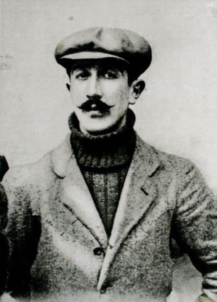 "Teniente aviador D. ALEJANDRO BELLO † 9-10 de Marzo 1914"